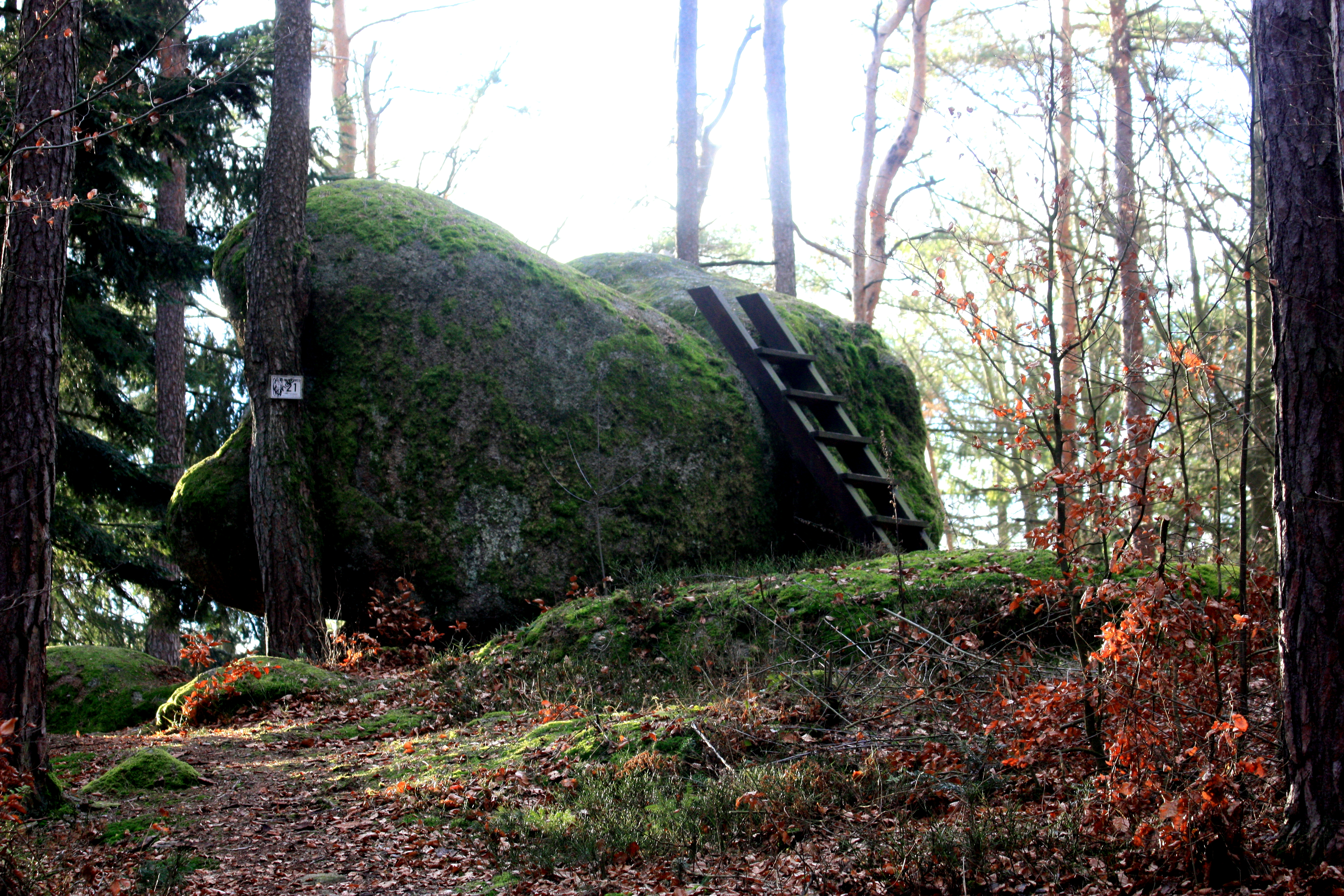 Das keltische Naturdenkmal Wasserstein, Nähe Nittenau. Über die Leiter gelangt man zur Wassermulde, in der sich angelblich immer Wasser befindet. Obejkt: Wasserstein in Frauenholz SE von Fischbach Nr. 376R019